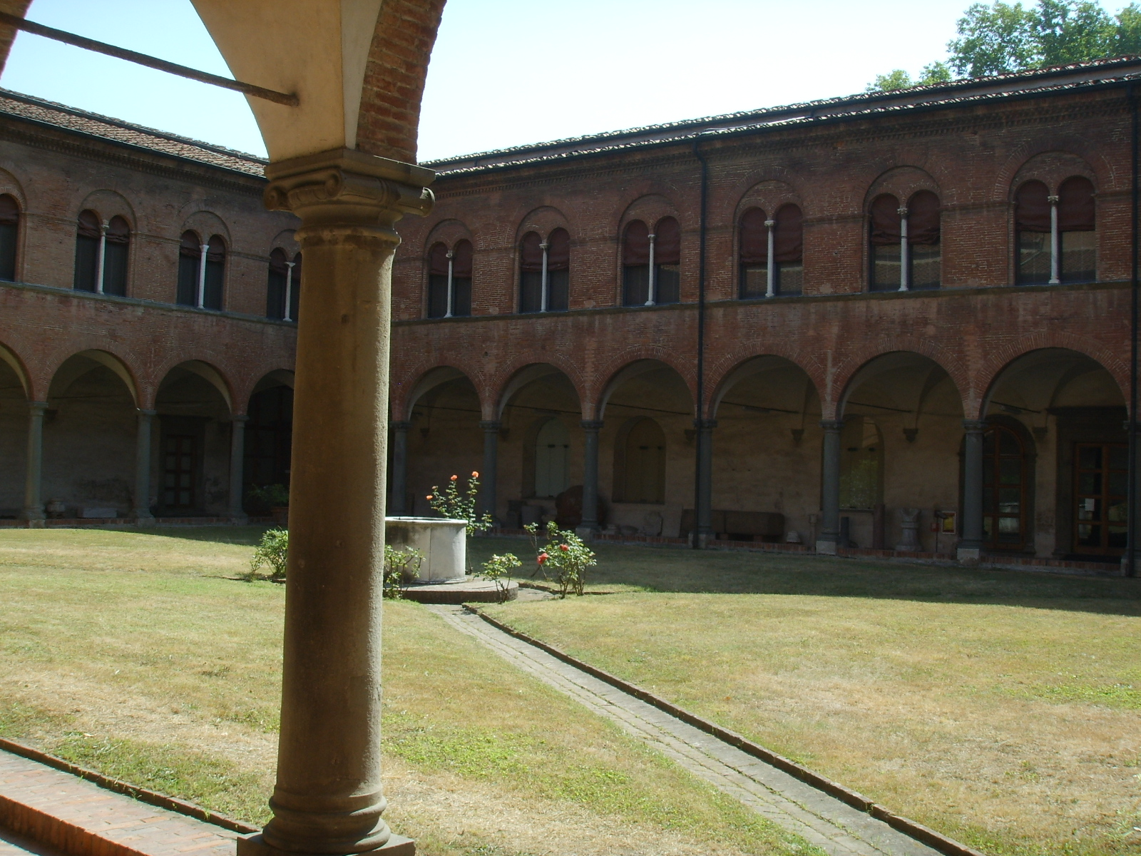 Museo di san matteo, cortile